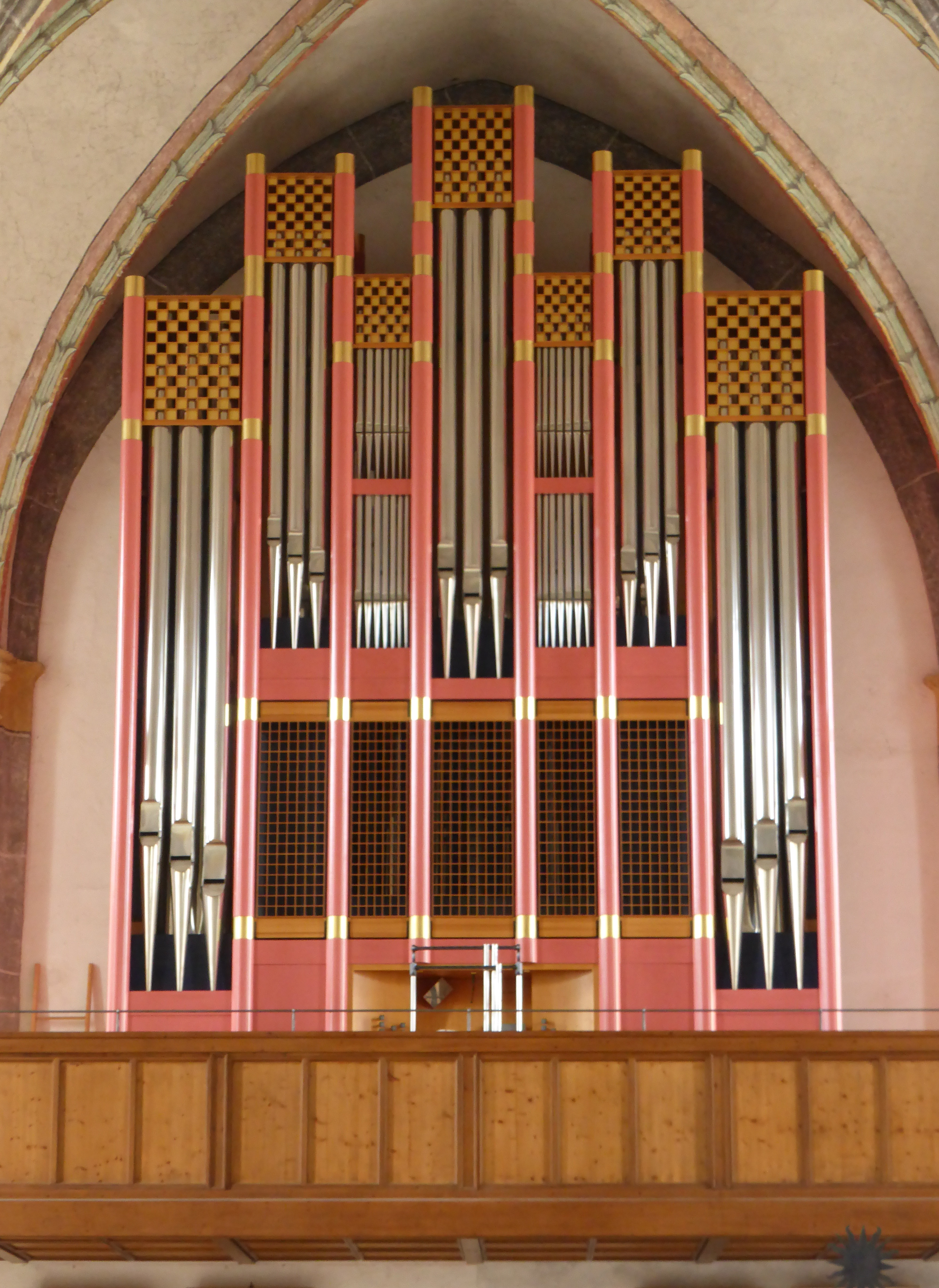 Rieger-Orgel Laufen an der Salzach, Stiftskirche